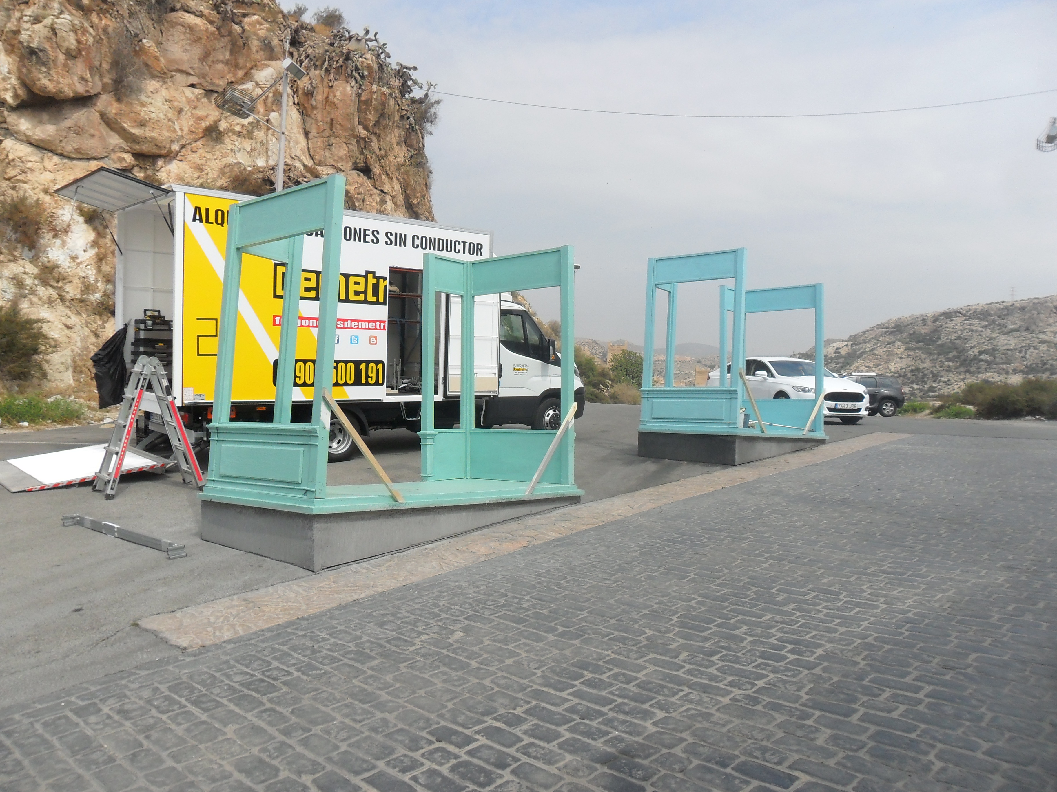 Decorado para el rodaje de The Rhythm Section en Almería